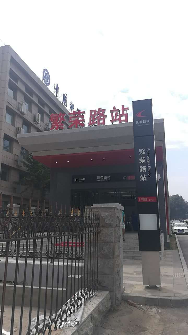 长春地铁繁荣路站出入口